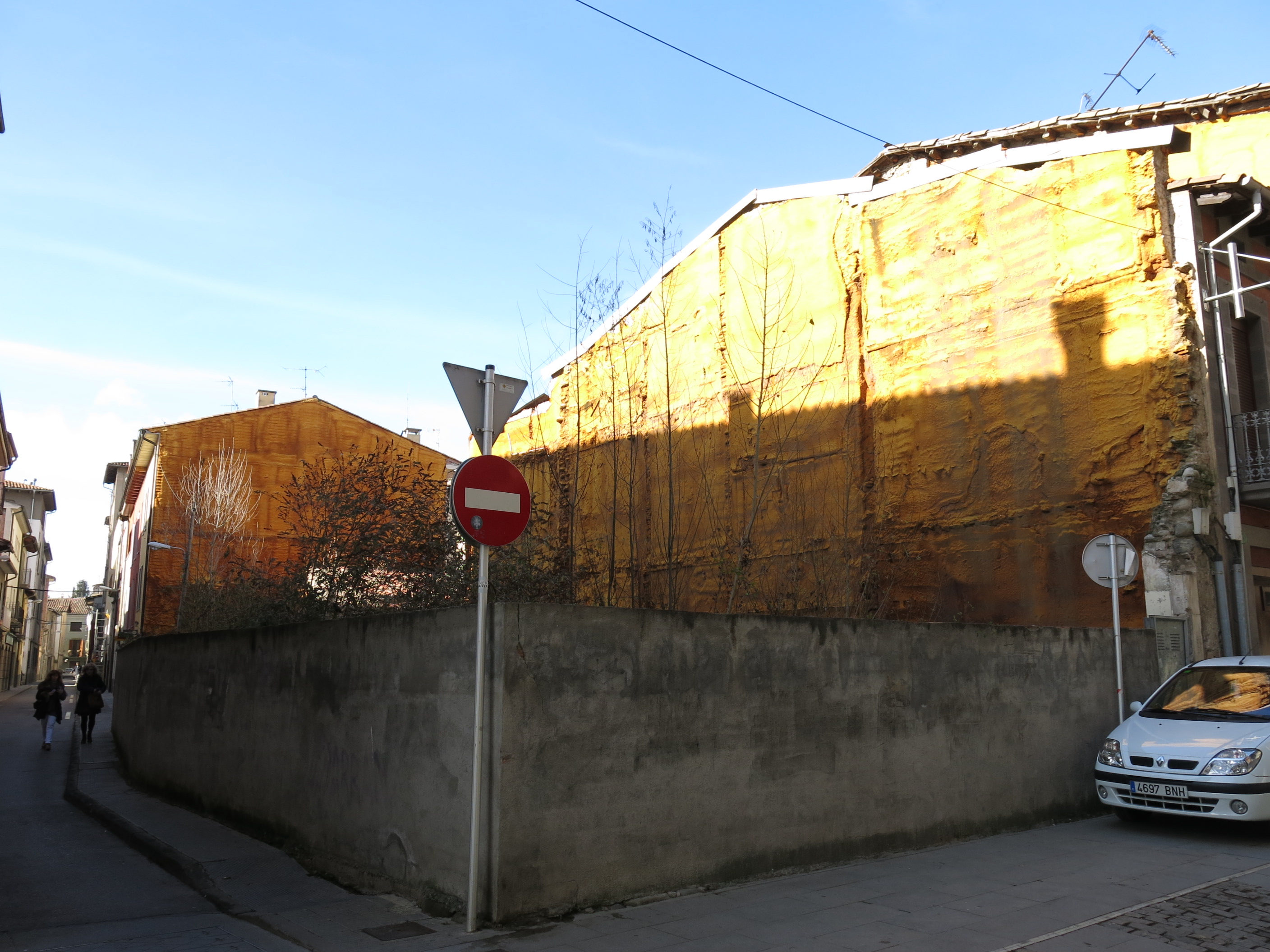 Habitatge al carrer del Pont, 32 (Manlleu)